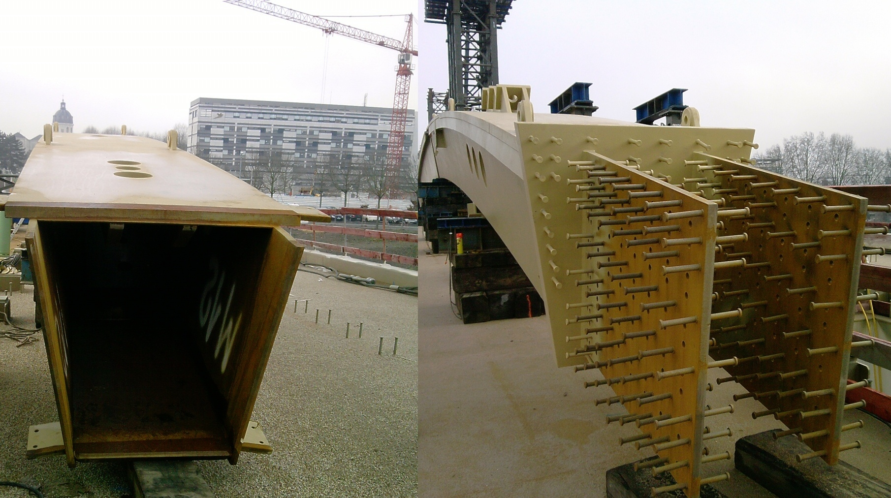 Coupe de l'arche métallique et vue sur la platine de liaison acier/béton du pont Confluence sur la Maine à Angers (49, France))